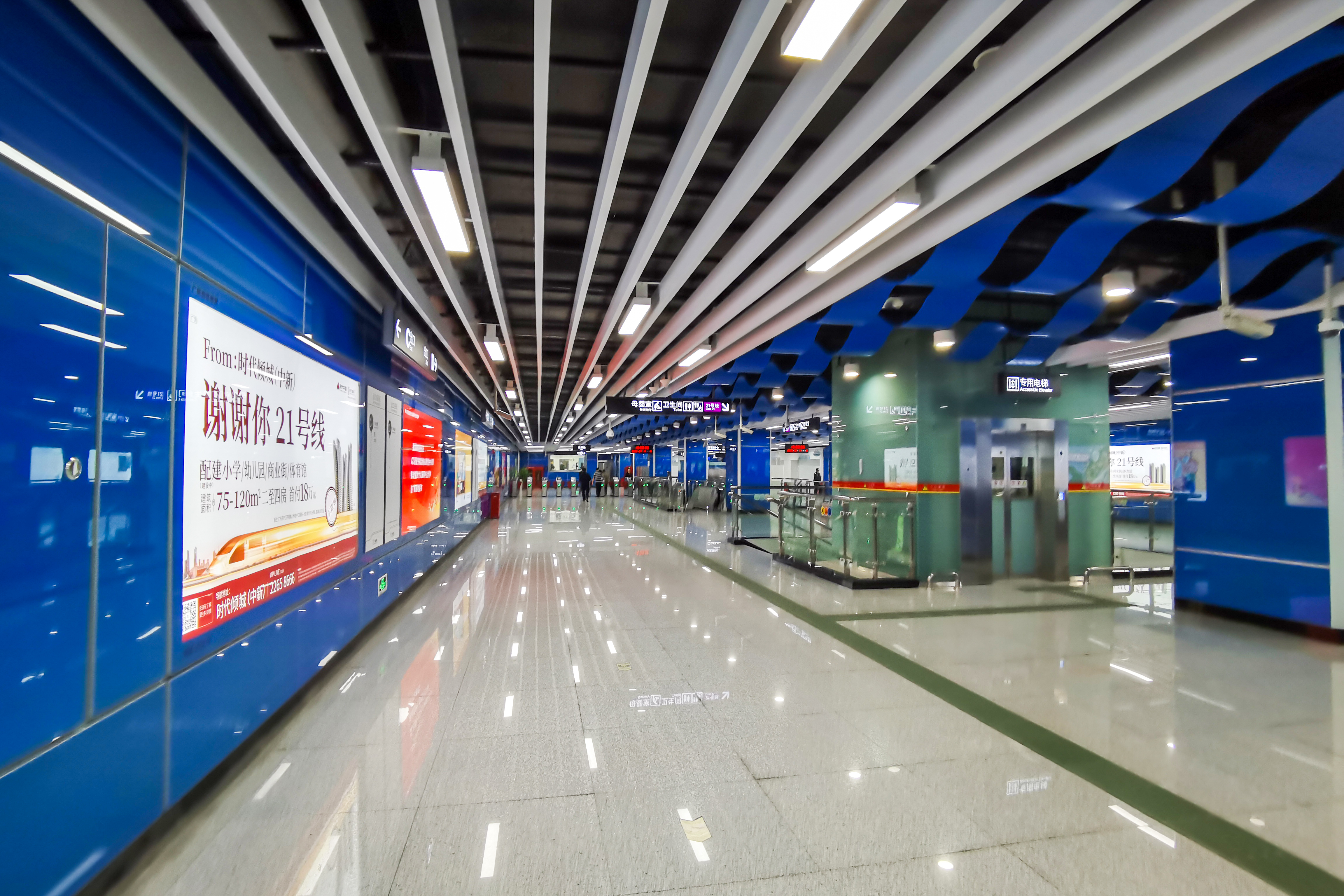 广州地铁凤岗站